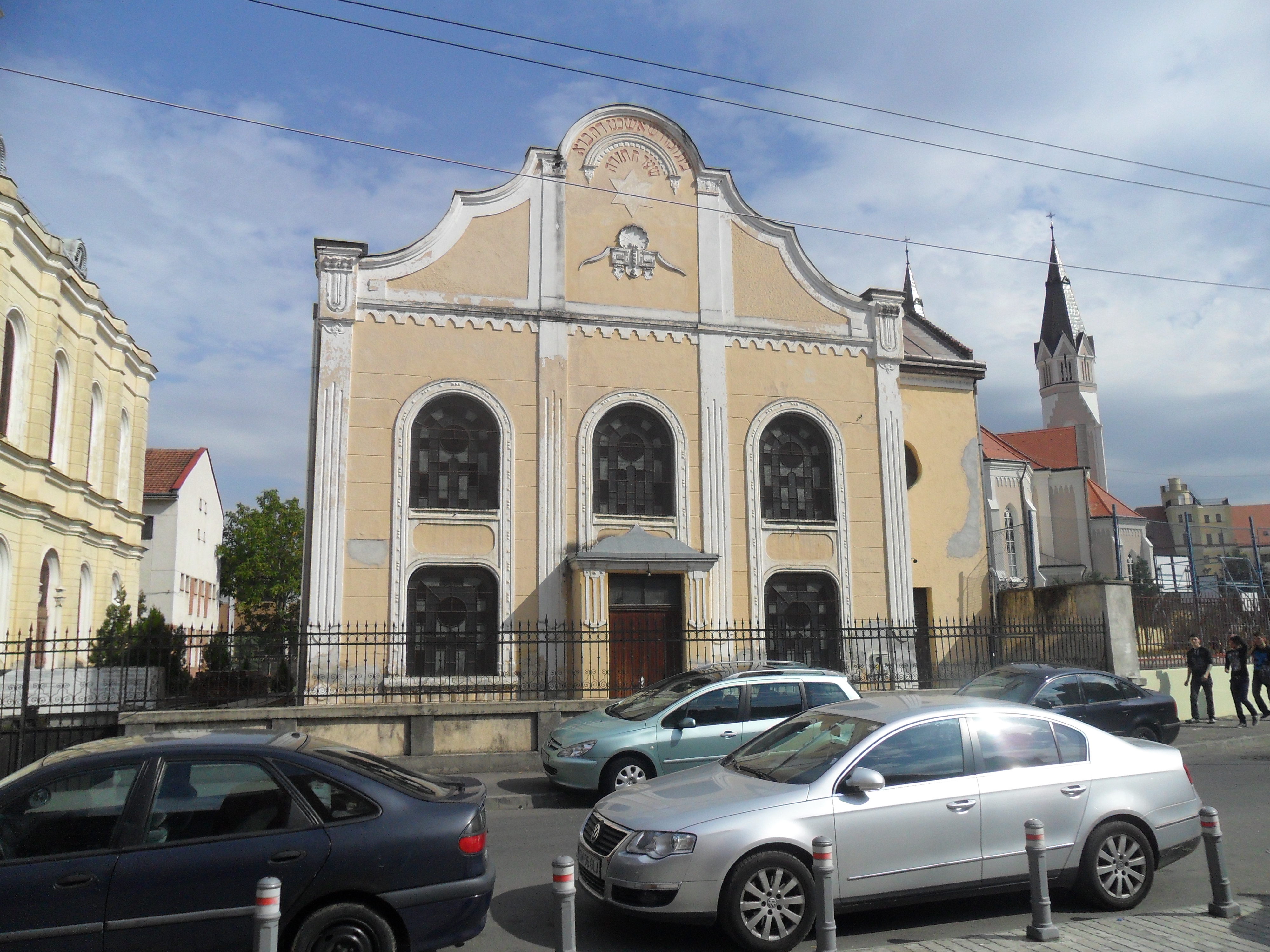 Casă de rugăciune 02